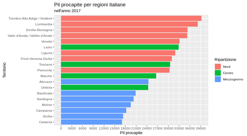 file realizzato con RStudio con dati Istat